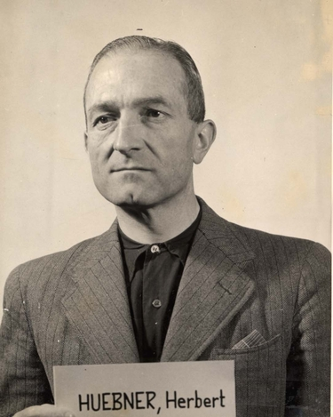 Herbert Hübner (* 7. August 1902 in Bad Salzschlirf; † unbekannt) war ein deutscher SS-Standartenführer und verurteilter Kriegsverbrecher.